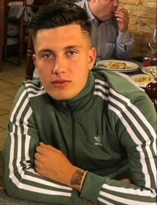 Imagen del futbolista Cristo González